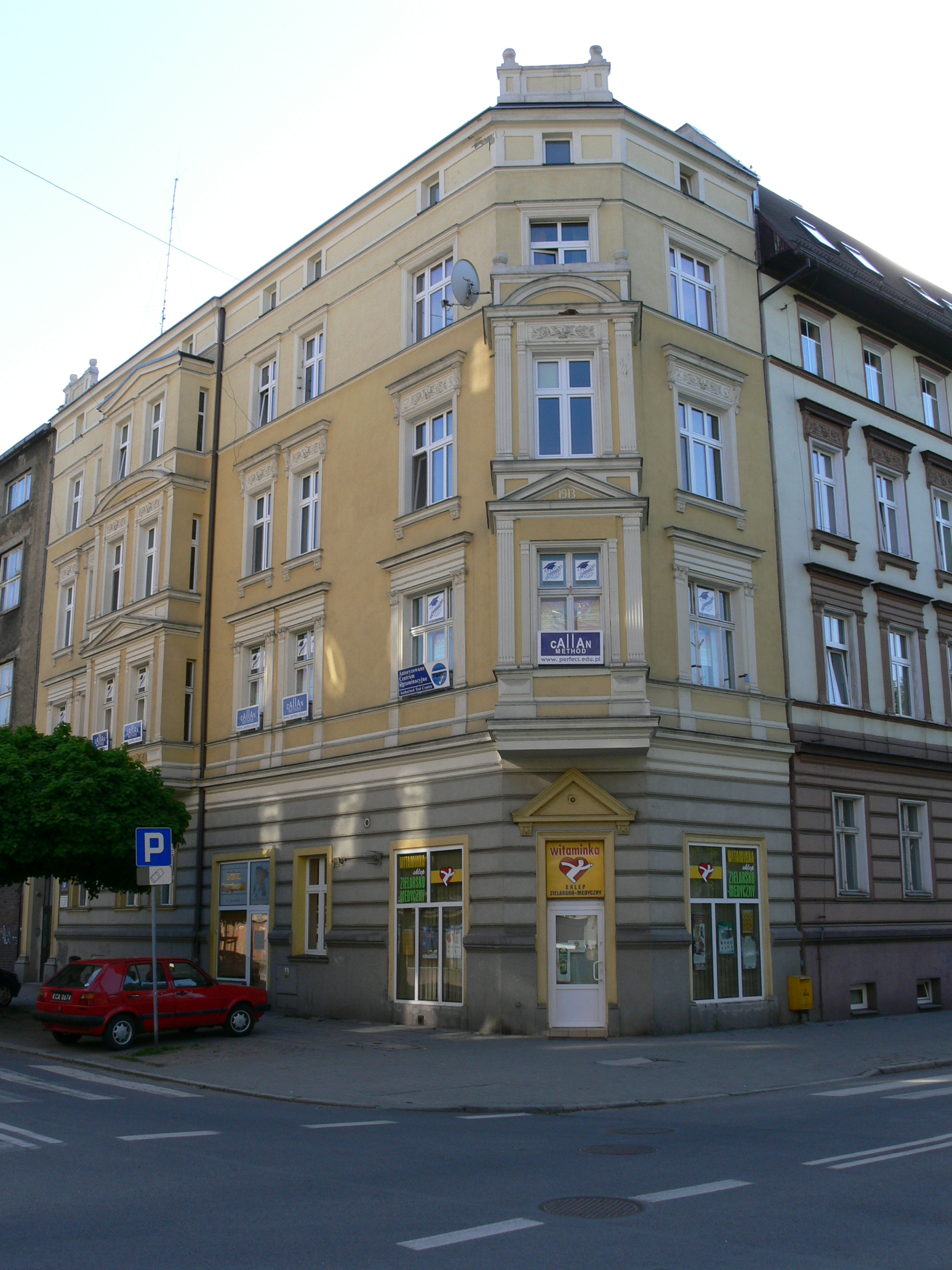 Racibórz - kamienica przy ul. Bema 1 (róg Staszica)